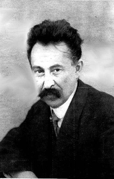 Bokányi Dezső (Pest, 1871. február 11. – Moszkva, 1943 júniusa) kőfaragó, író, újságíró, fordító, szóvivő, politikus, a Magyarországi Tanácsköztársaság időszakában munkaügyi és népjóléti népbiztos.